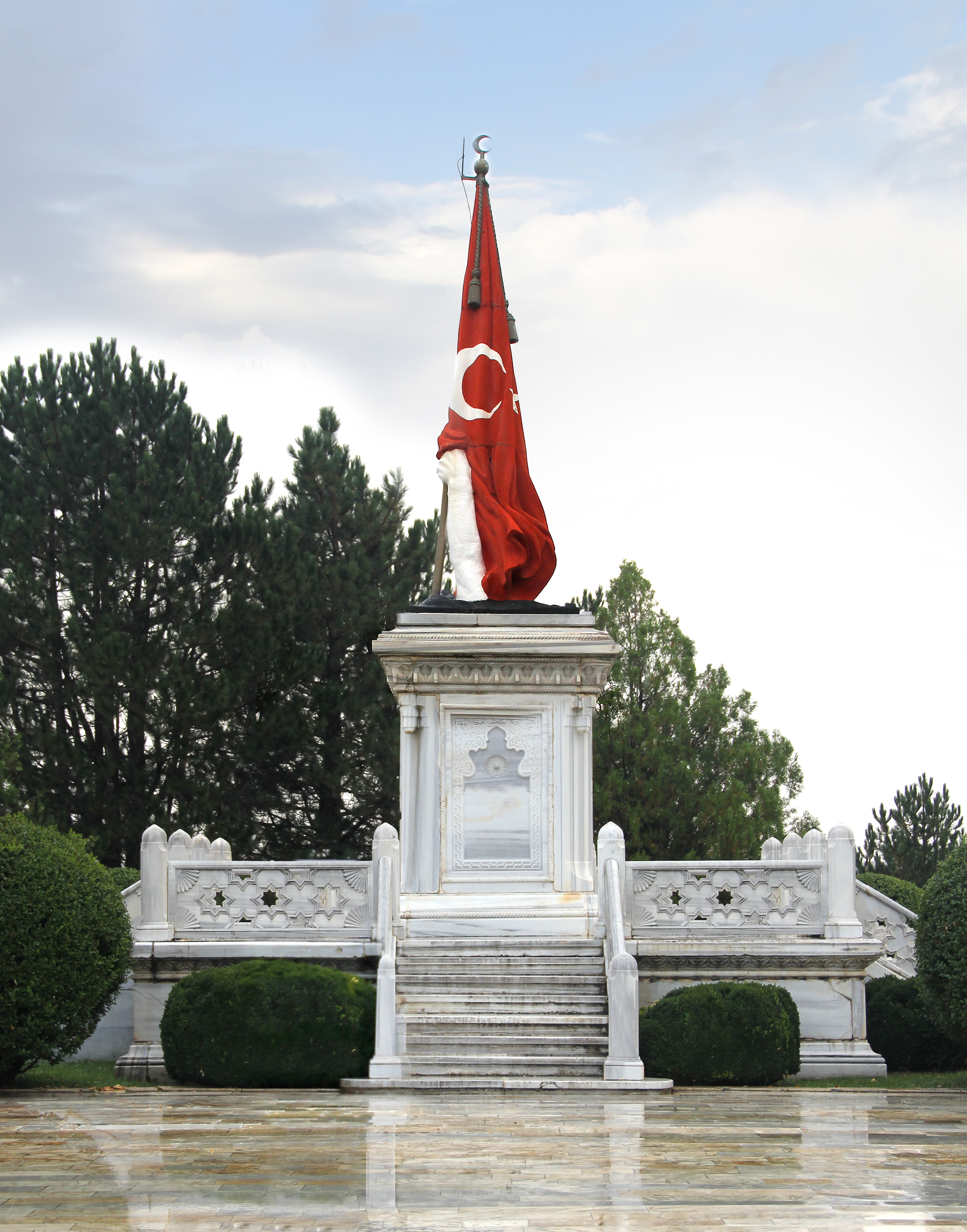 Kütahya'nın Altıntaş ilçesindeki Şehit Sancaktar Mehmetçik Anıtı